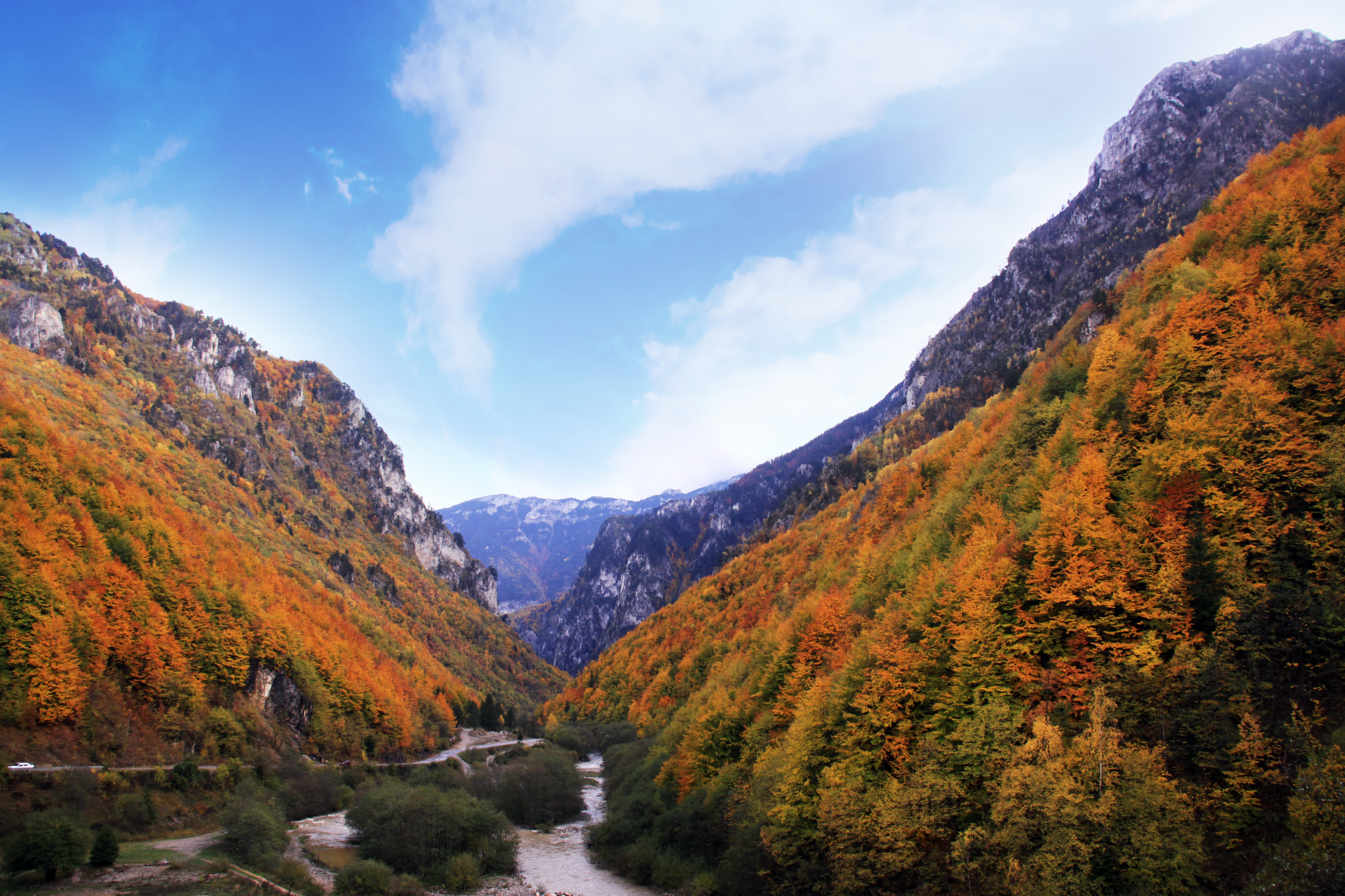 Parku Kombëtar Bjeshkët Nemuna, Pejë, Deçan, Istog, Junik, Gjakovë